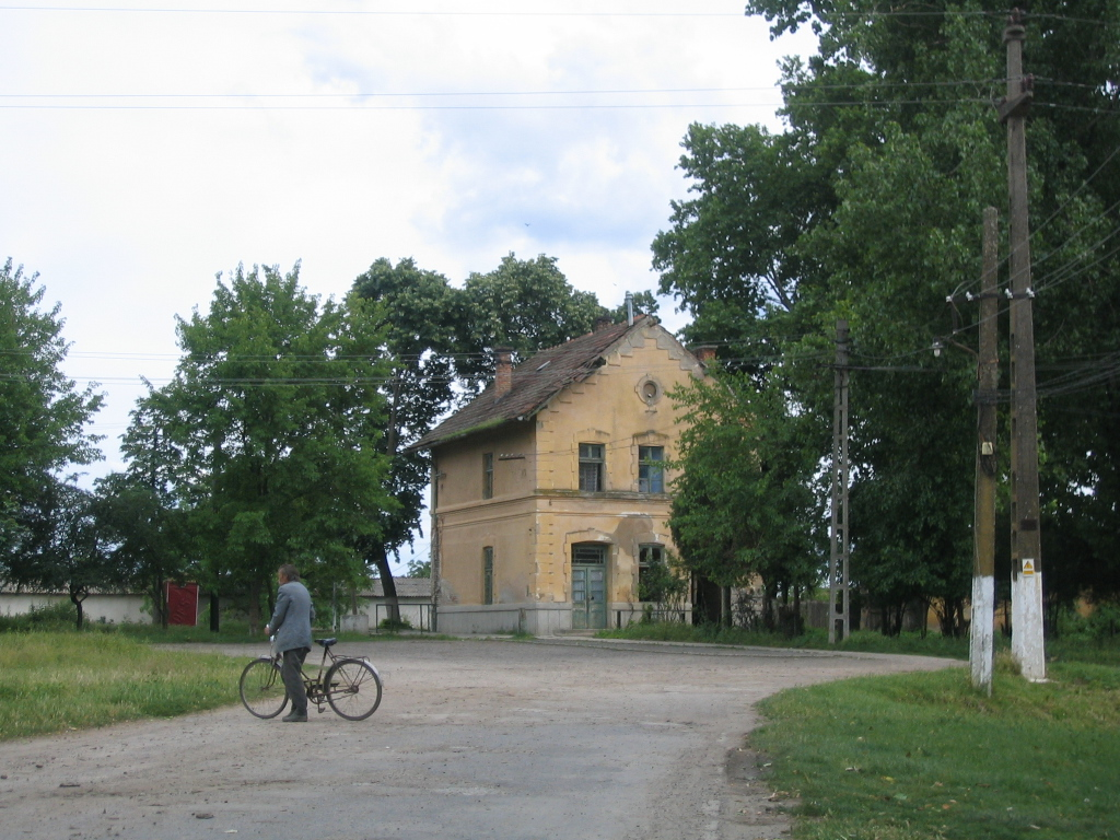 Gara din Teremia Mare, județul Timiș